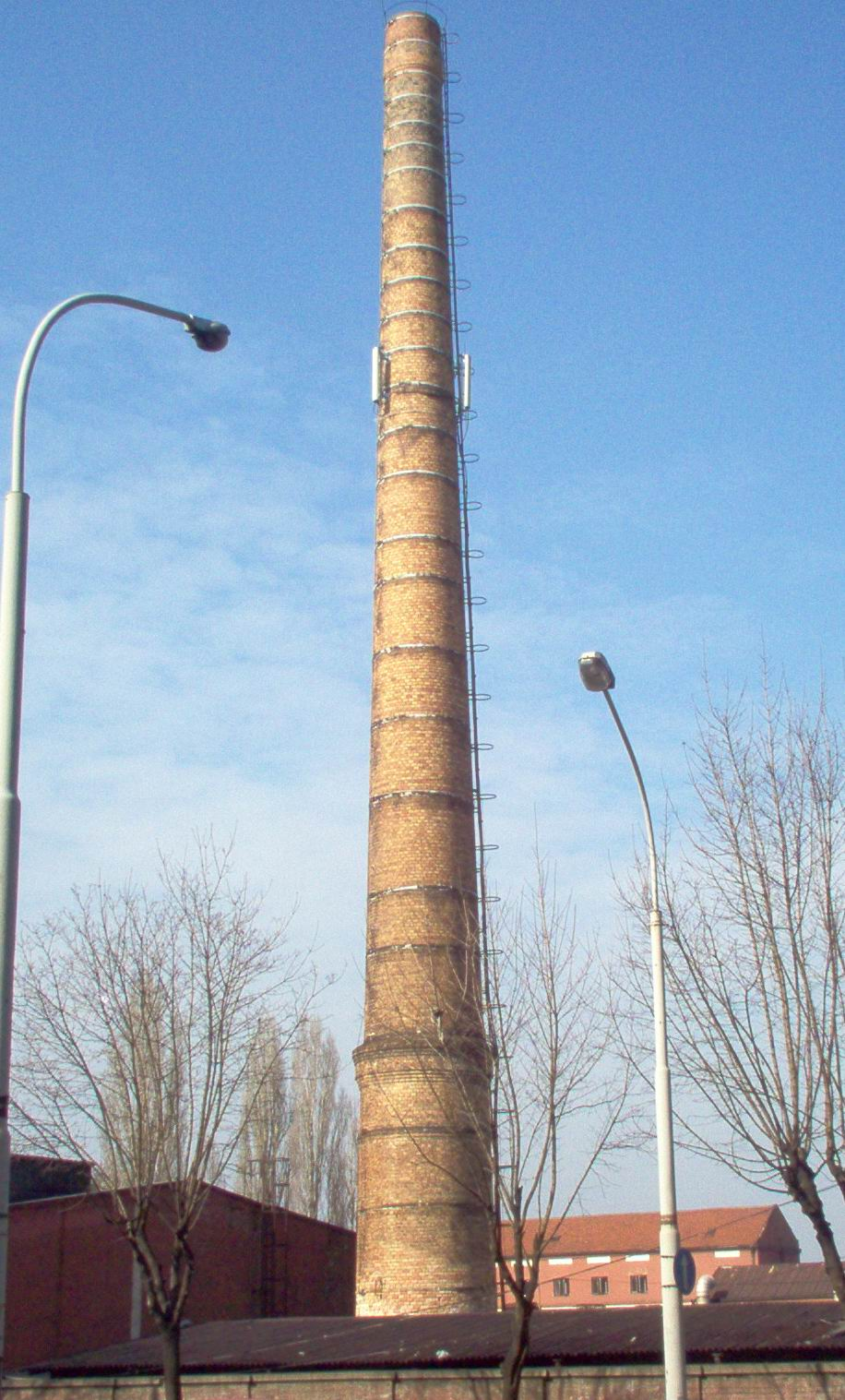 Фабрички димњак, Београд, улица деспота Стефана